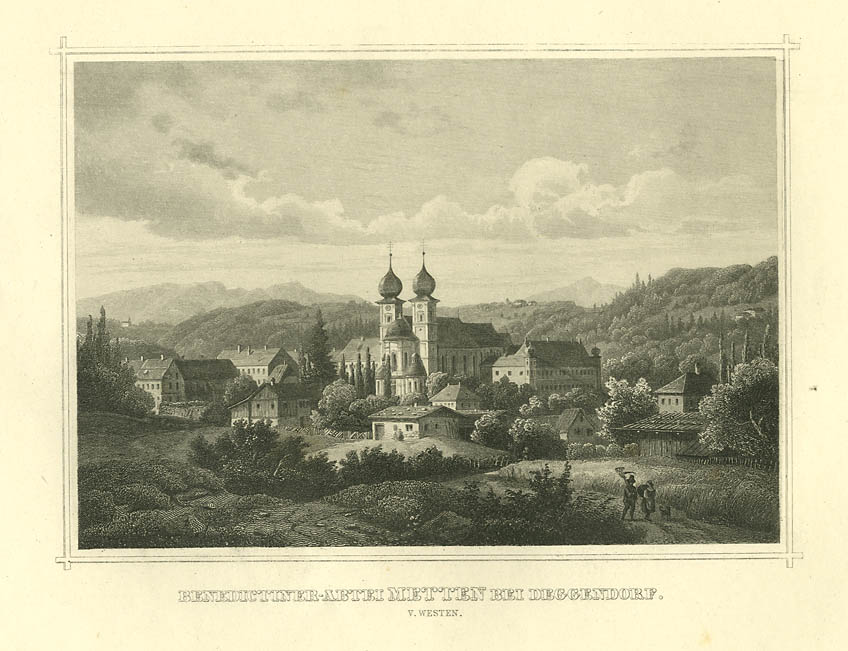 Benedictiner-Abtei Metten bei Deggendorf; von Westen, Stahlstich, um 1880 aus: Das Königreich Bayern. Seine Denkwürdigkeiten und Schönheiten, München, 1879/1881